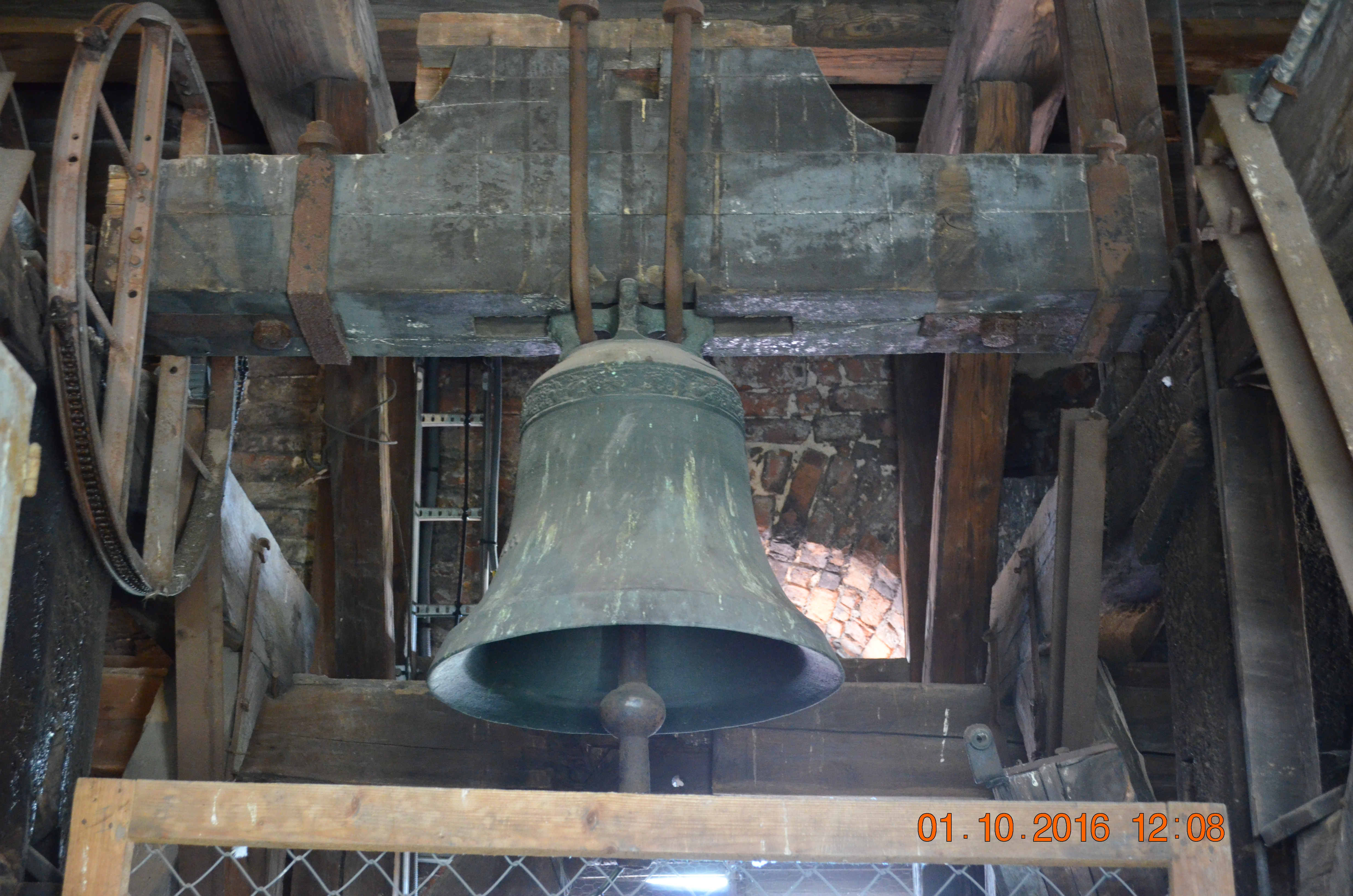 Sredni dzwon Parafii Ewangelicko Augsburskiej w Kluczborku (2016)